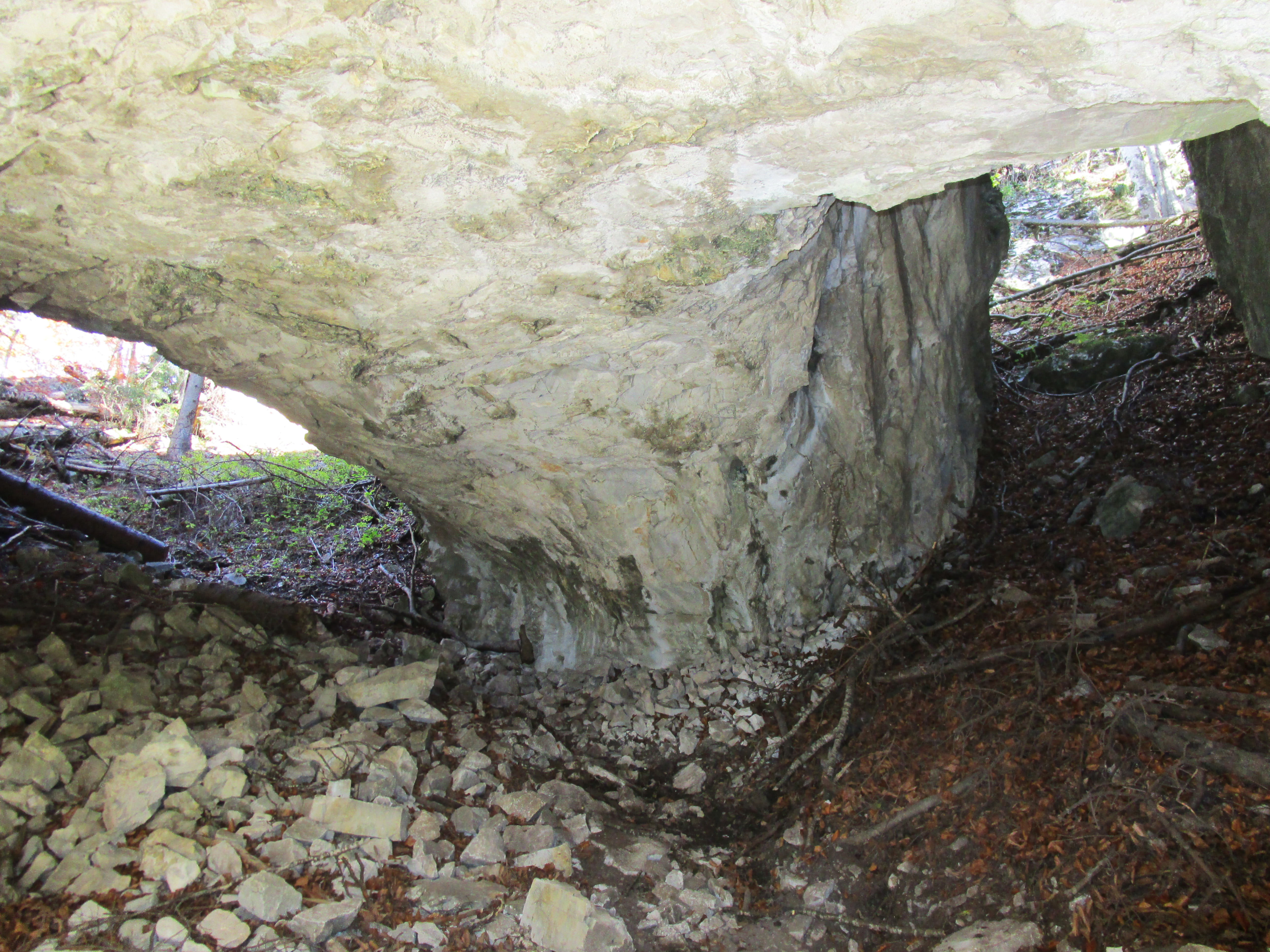 Wagenhüttentorborgen (Felsentor) am Ostufer der Weizklamm